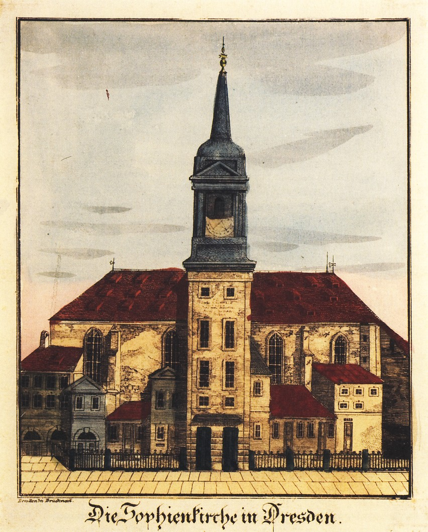 Die Sophienkirche in Dresden vor 1840, kolorierte Lithografie